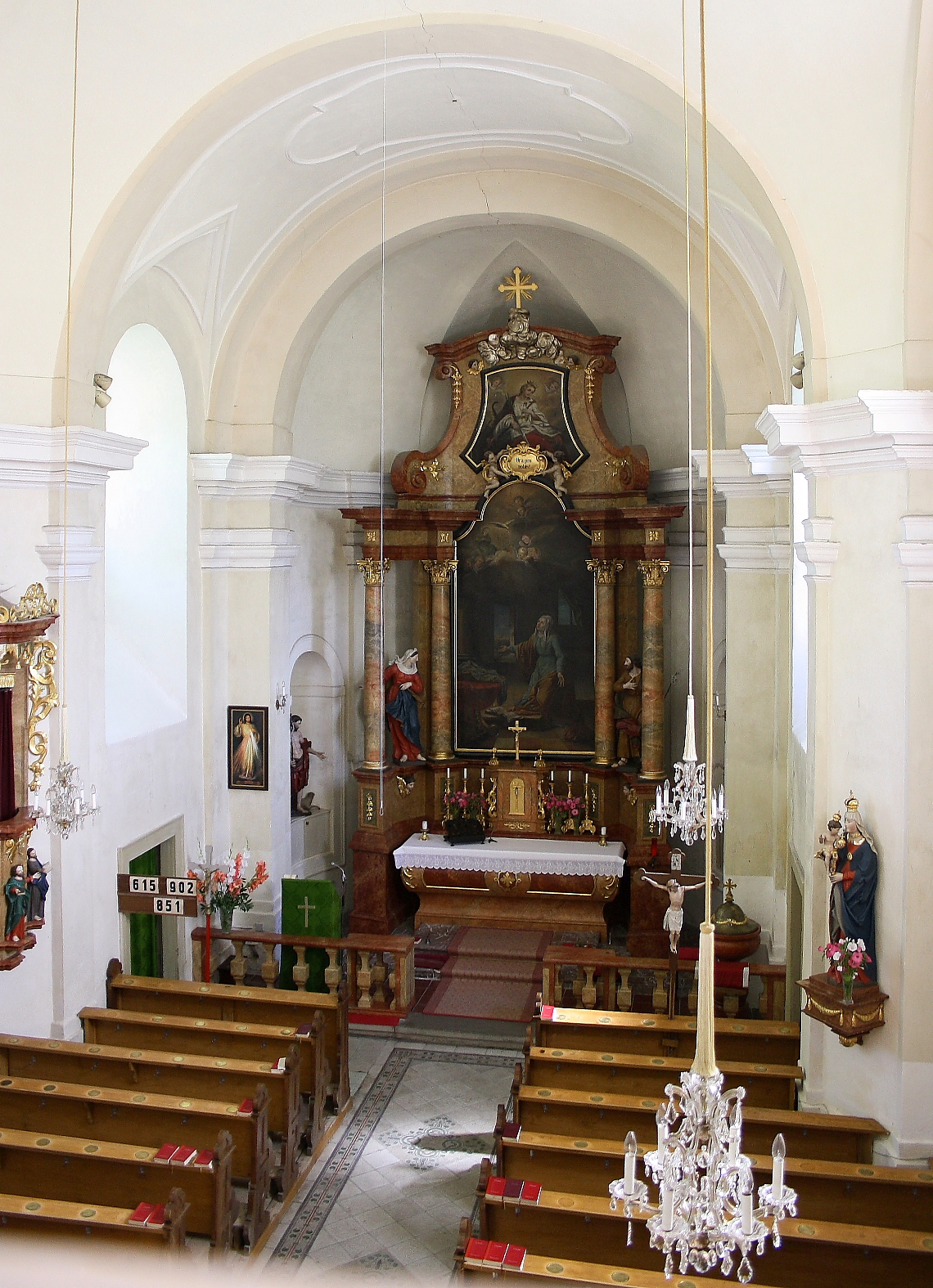 Innenansicht Richtung Altar der Pfarrkirche Puchenstuben.